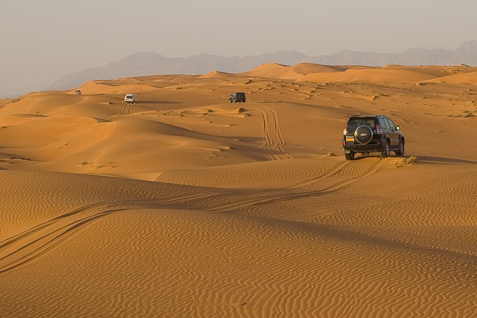 Wahiba Sands, Oman